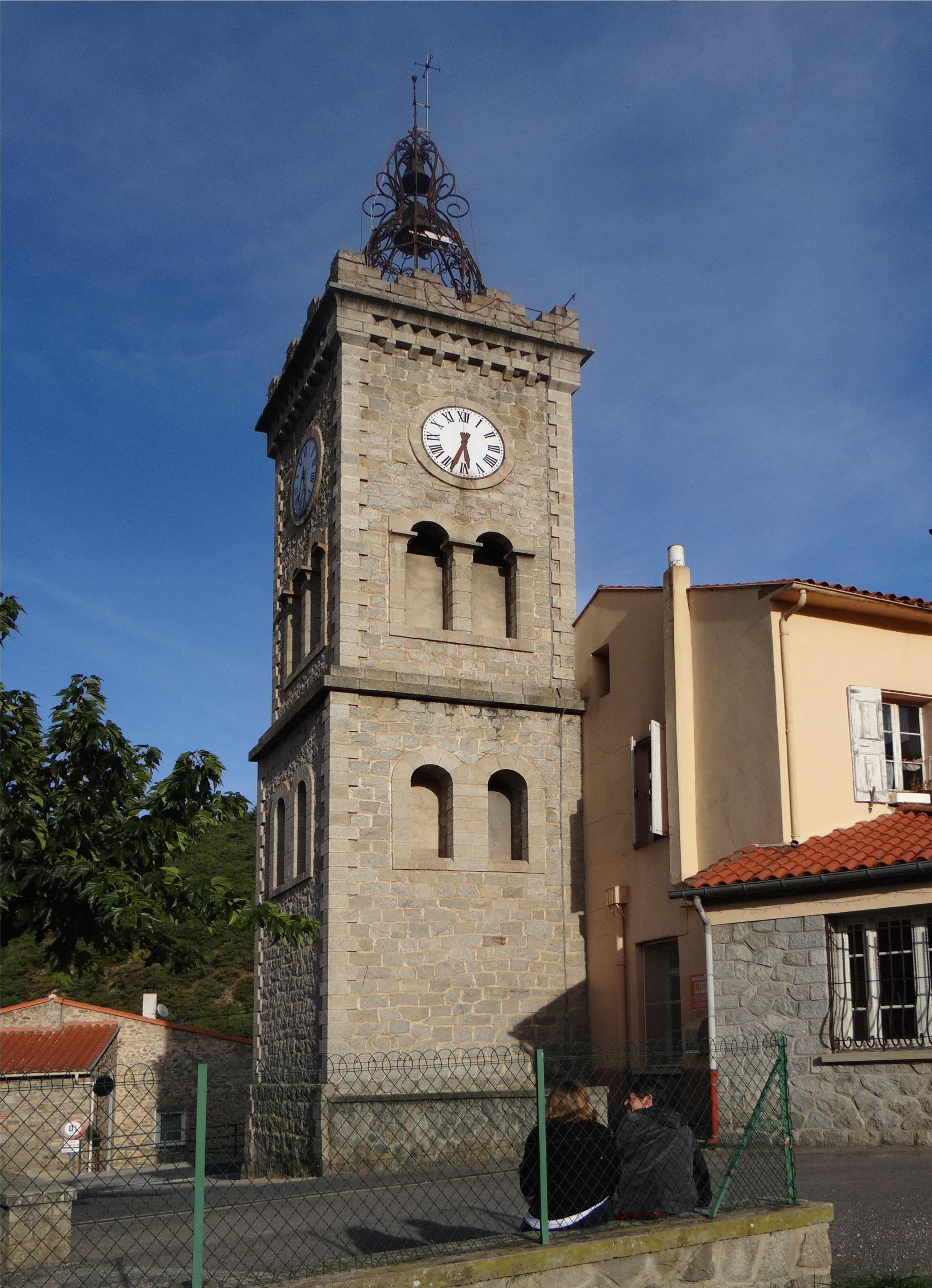 Ancienne mairie, Fuilla, Pyrénées-Orientales, France.